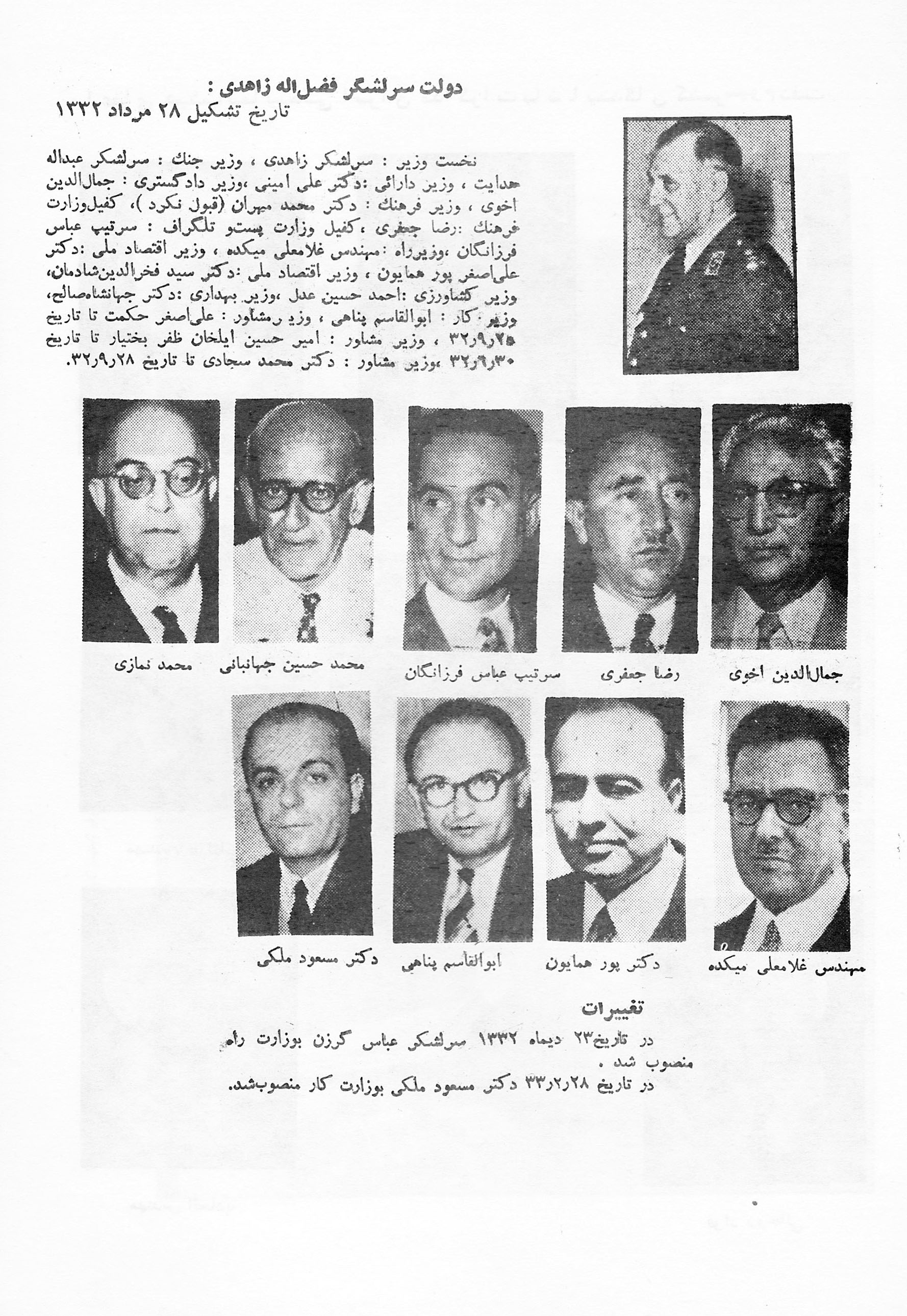 Cabinet militaire du général Zahédi, Premier Ministre de l'Iran 1953-1955